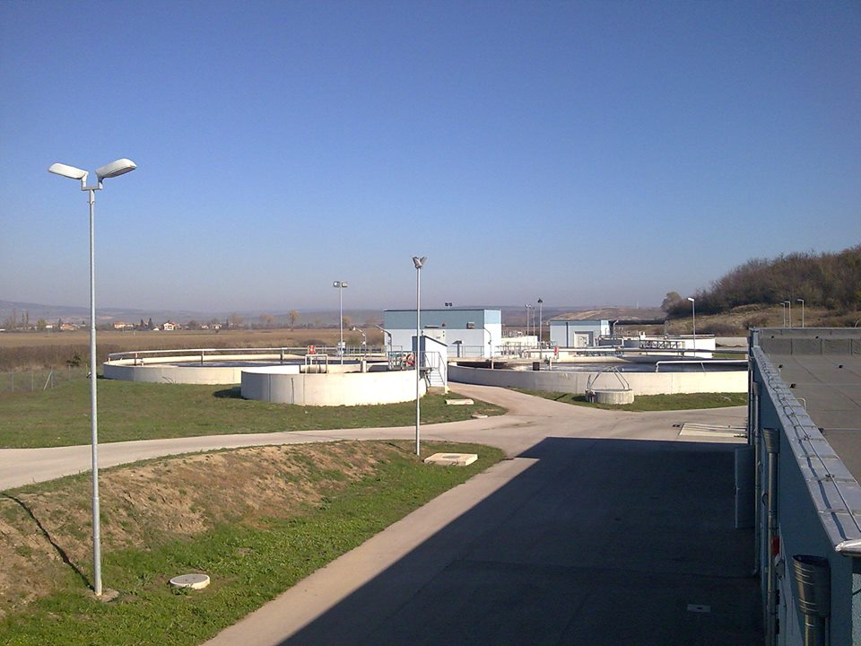 ПСОВ Попово - Биобасейни